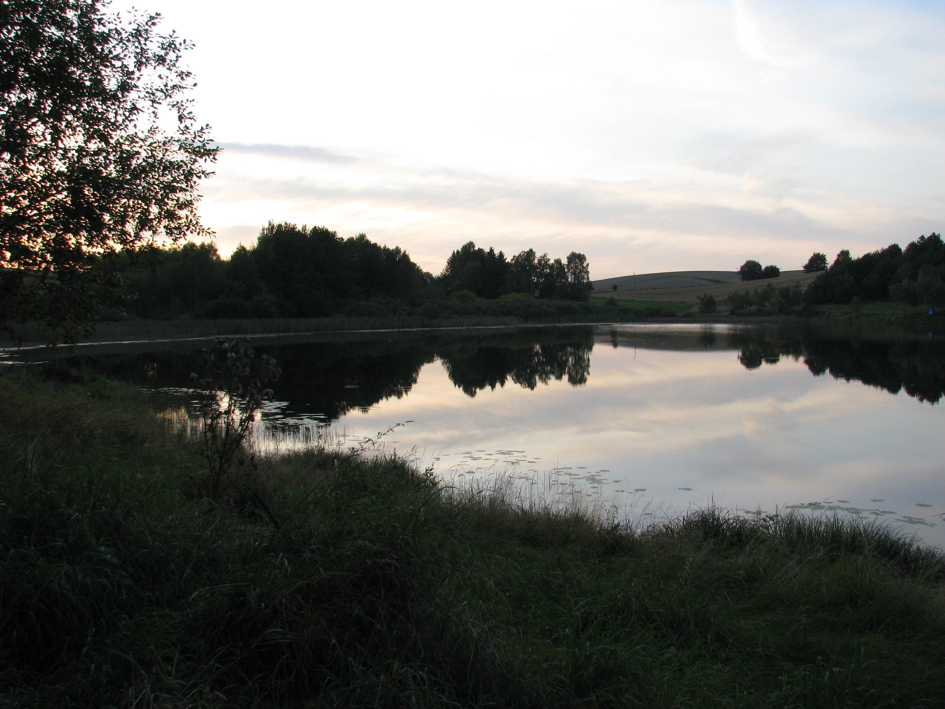 Udorpie - Jezioro Watra od strony południowej